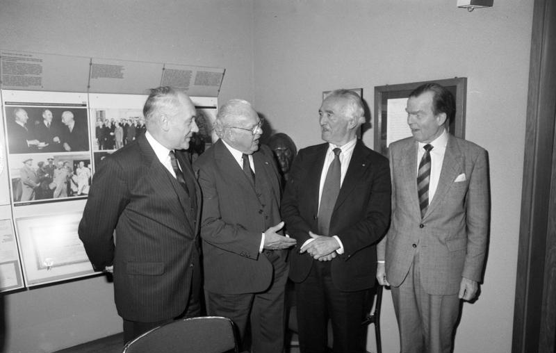 Rhöndorf, 25. Oktober 1989 Wissenschaftliche Tagung in der Stiftung Bundeskanzler-Adenauer-Haus. Das Thema der Tagung, die von dem Bonner Politikwissenschaftler Prof. Dr. Hans-Peter Schwarz geleitet wurde, lautete: "Konrad Adenauers Regierungsstil".